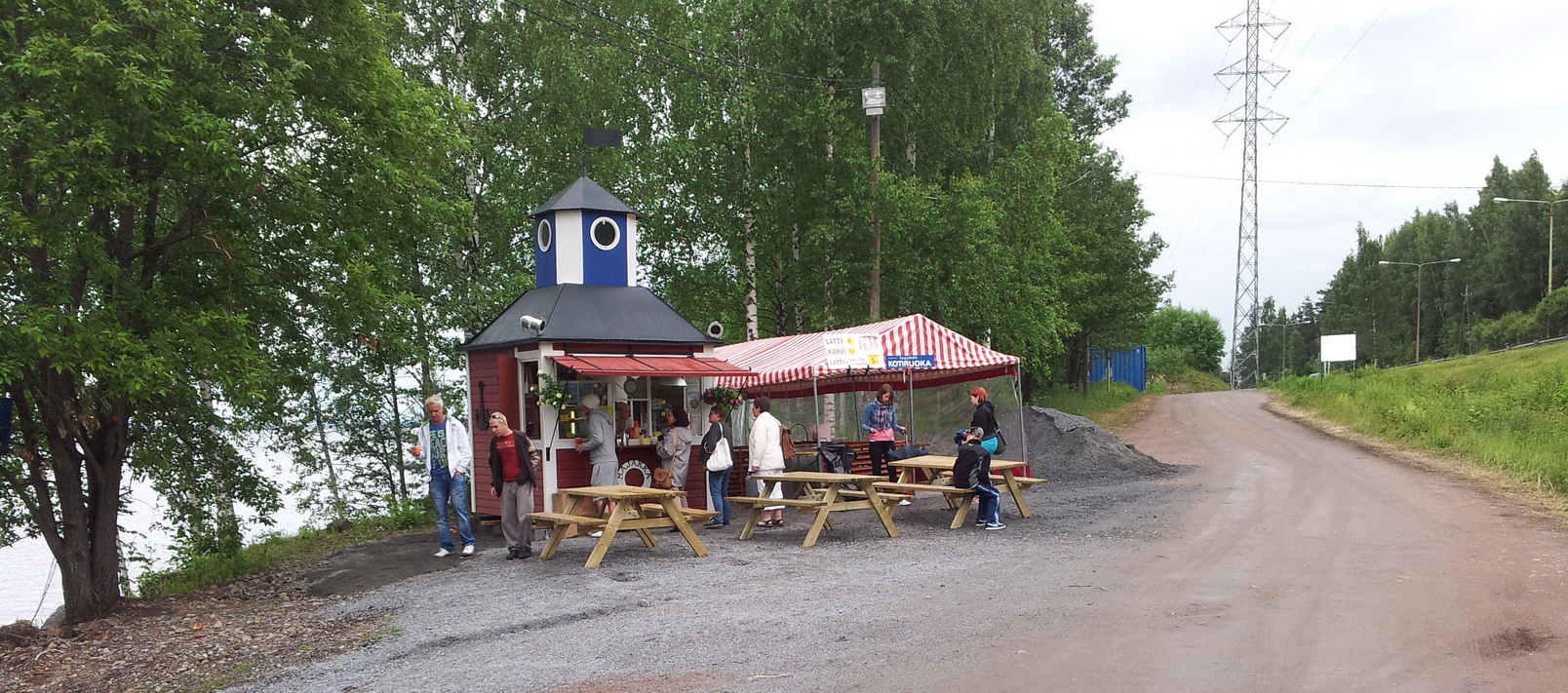 Description